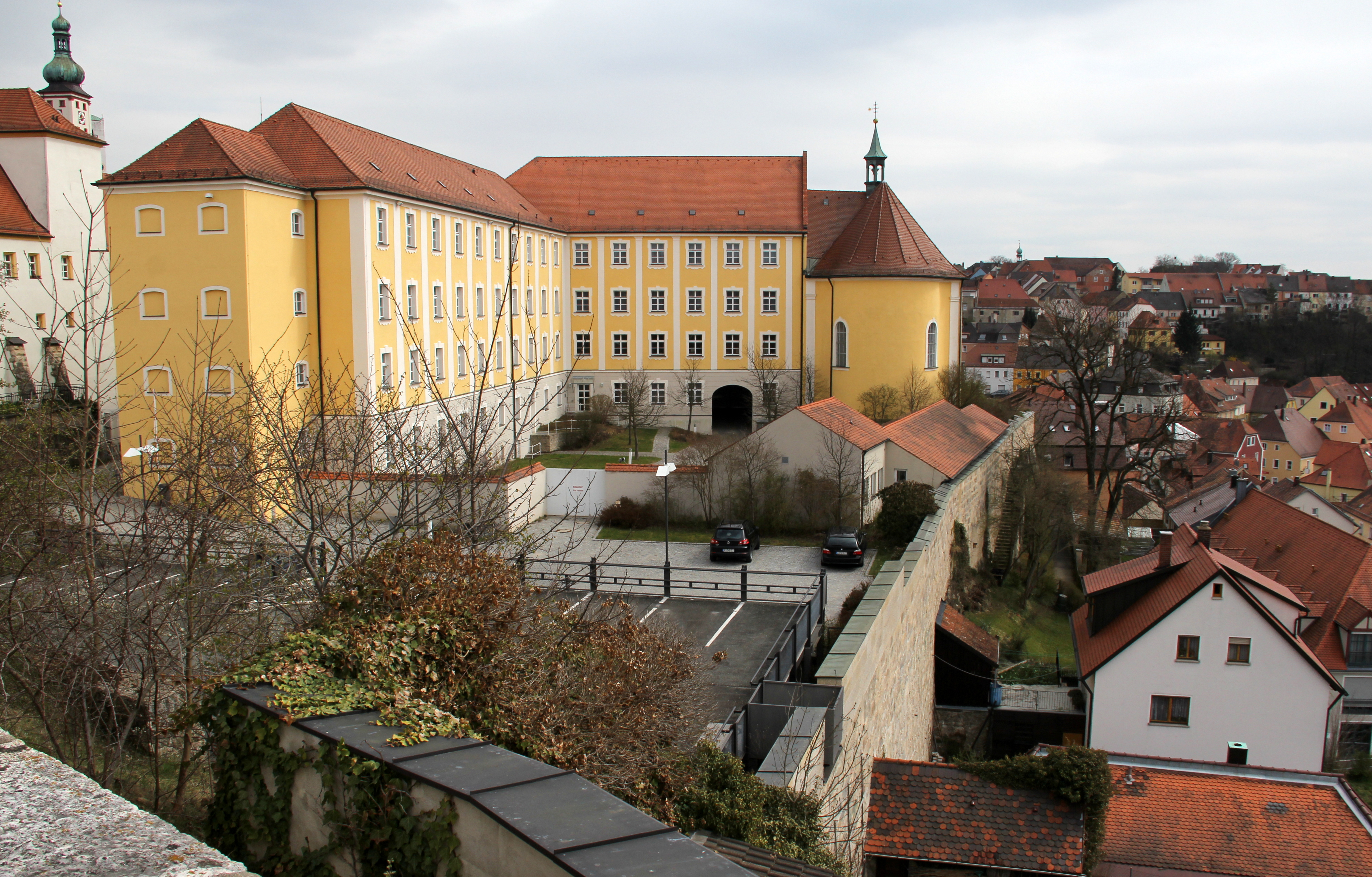 Blick von Burg